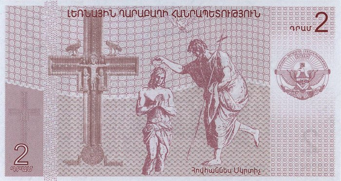 2 Dram